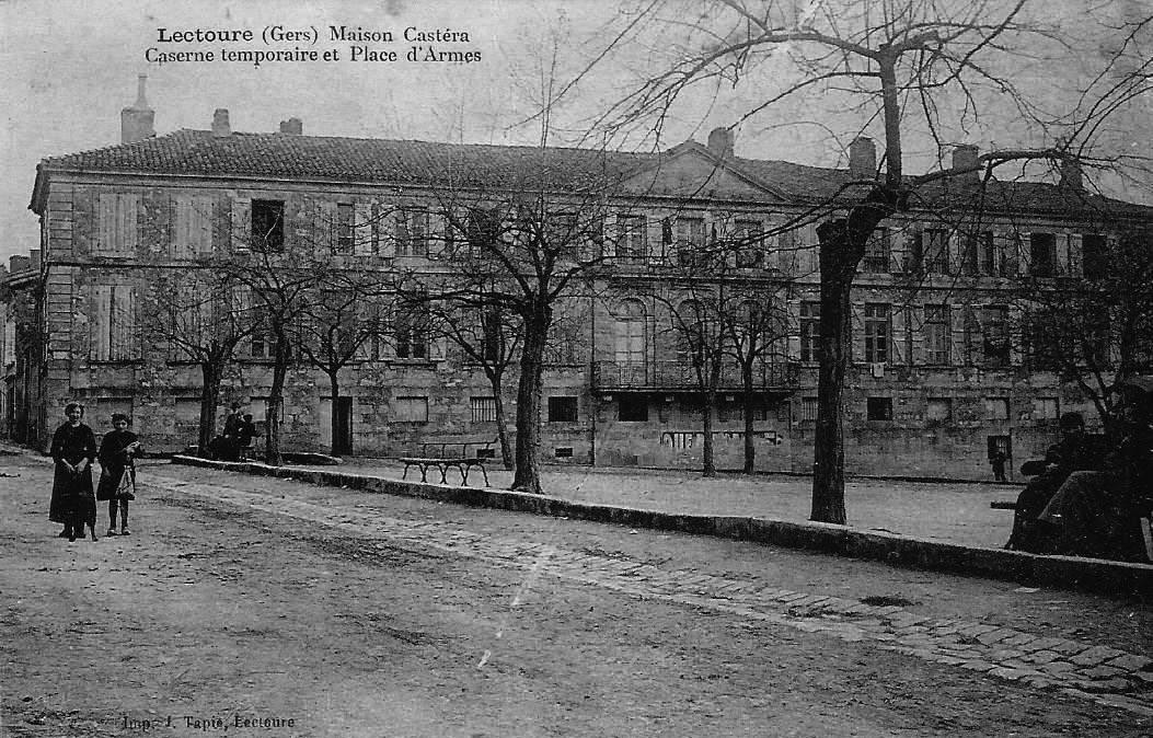 Lectoure, Gers, Occitanie, France. Hôtel de Goulard. Carte postal anciennee, début XXe siècle.